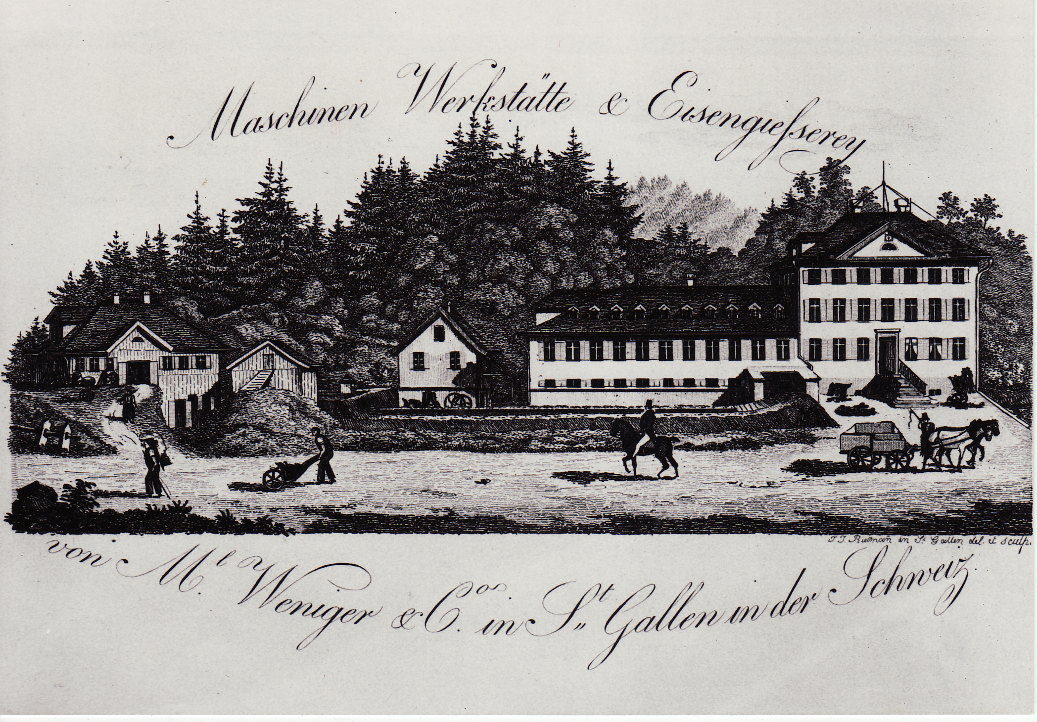 Illustration Maschinen Werkstätte & Eisengiesserei M. Weniger, St.Georgen-Strasse 160, 160a aus dem Jahr 1835